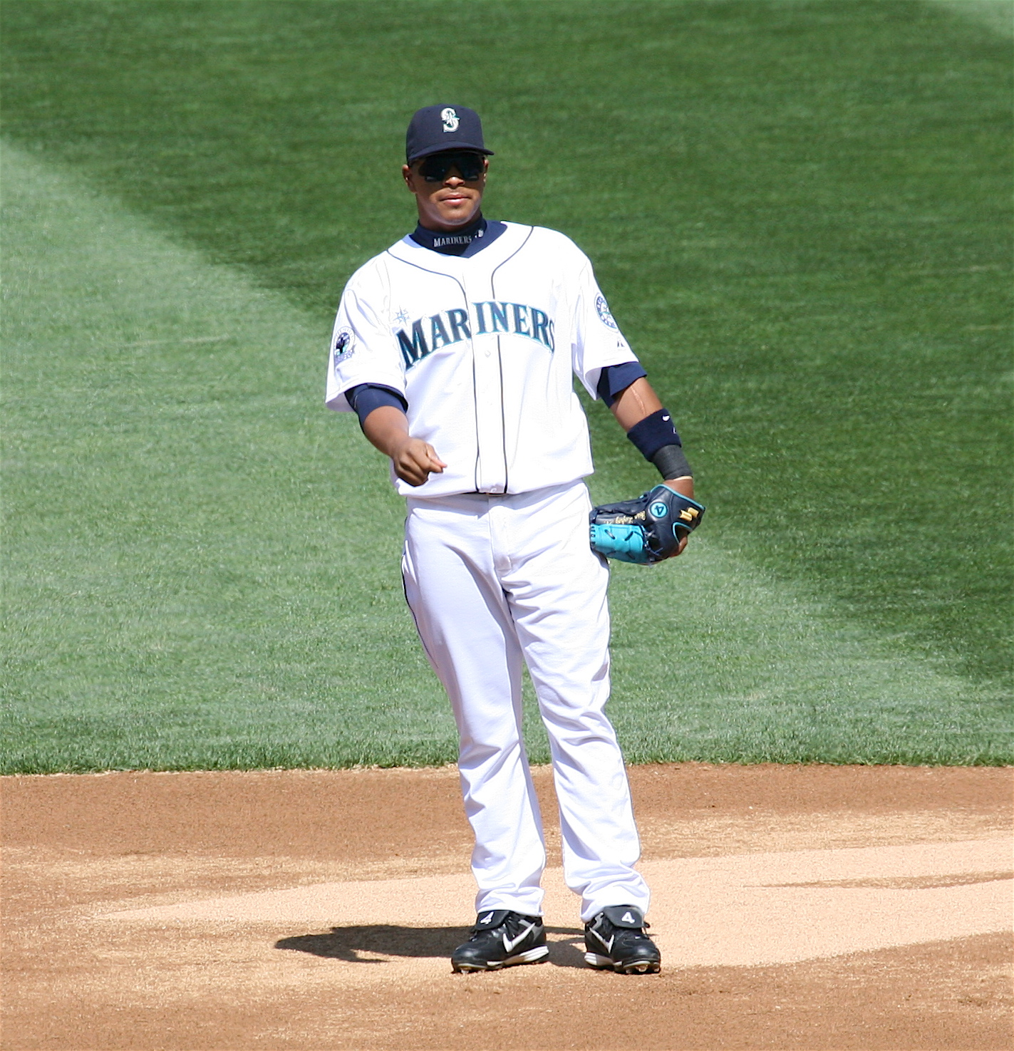 José López